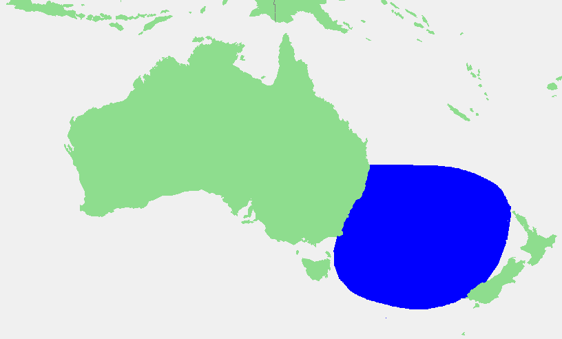 Tasman Sea